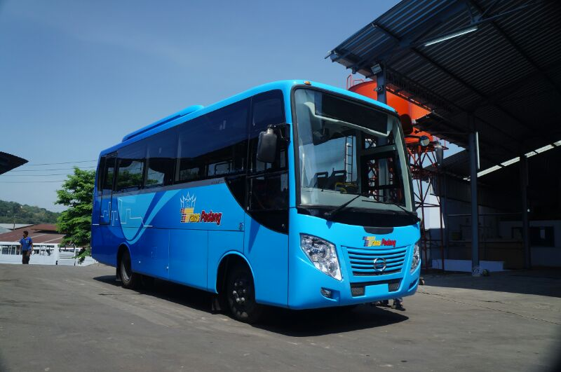 TransPadang parkiran